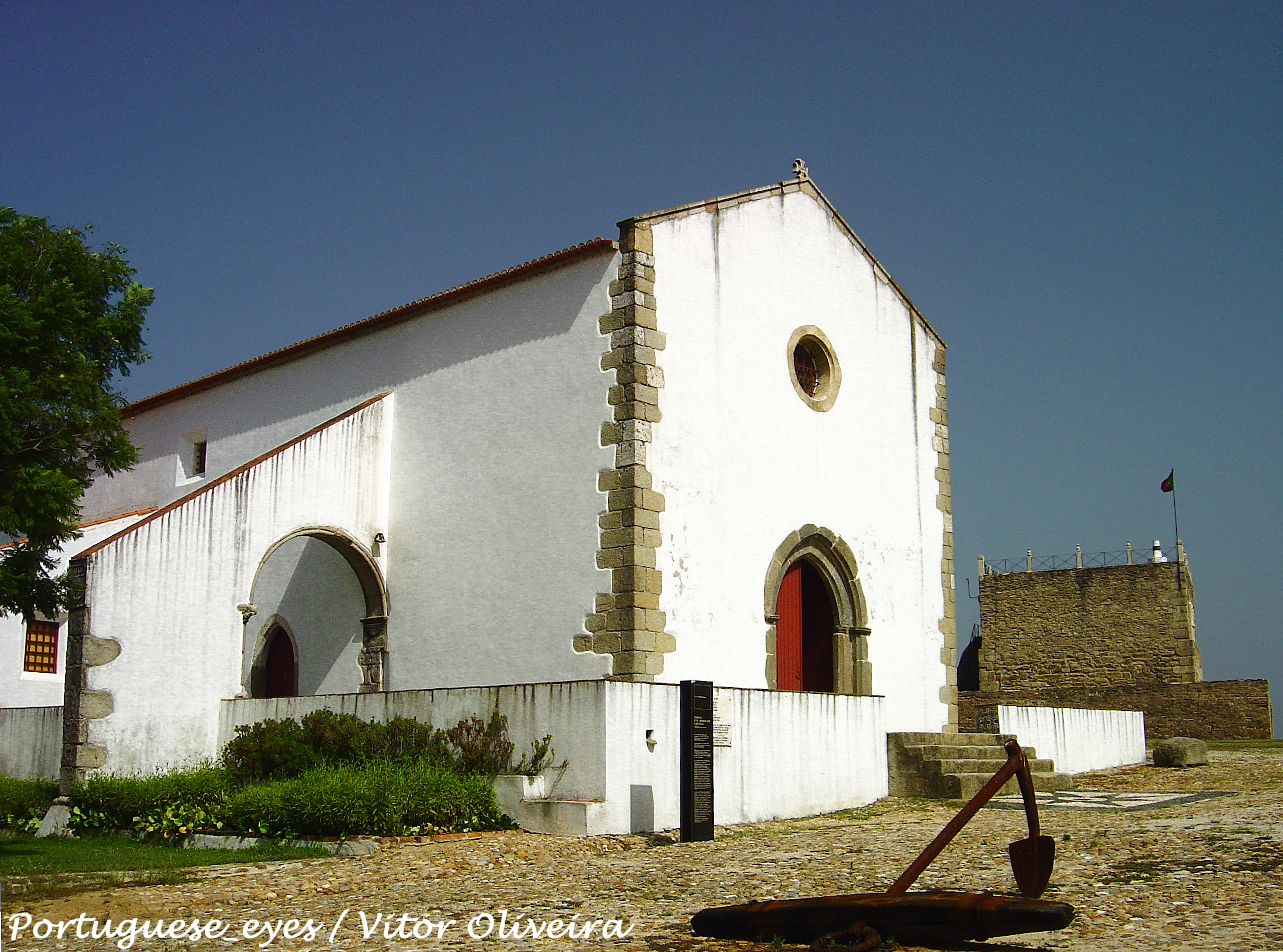 Considerada Monumento Nacional. Construída presumivelmente no século XIII, no reinado de D. Afonso II. A partir do século XVI, transformou-se em Panteão dos Almeidas, passando a albergar os preciosos túmulos dos ilustres D. Diogo, D. Lopo e D. João de Almeida. O actual templo data do século XV. Foi extinta ao culto em 1834. Em 1921 recebeu o actual Museu D. Lopo de Almeida, onde se pode encontrar, em exposição permanente, notáveis colecções de estatuária sacra e um espólio arqueológico interessante, recolhido no concelho de Abrantes. O interior da Igreja conserva ainda na sua capela-mor, um notável núcleo de azulejos hispano-árabes de “corda-seca” e um baldaquino flamejante, raro e valioso. See where this picture was taken. [?]